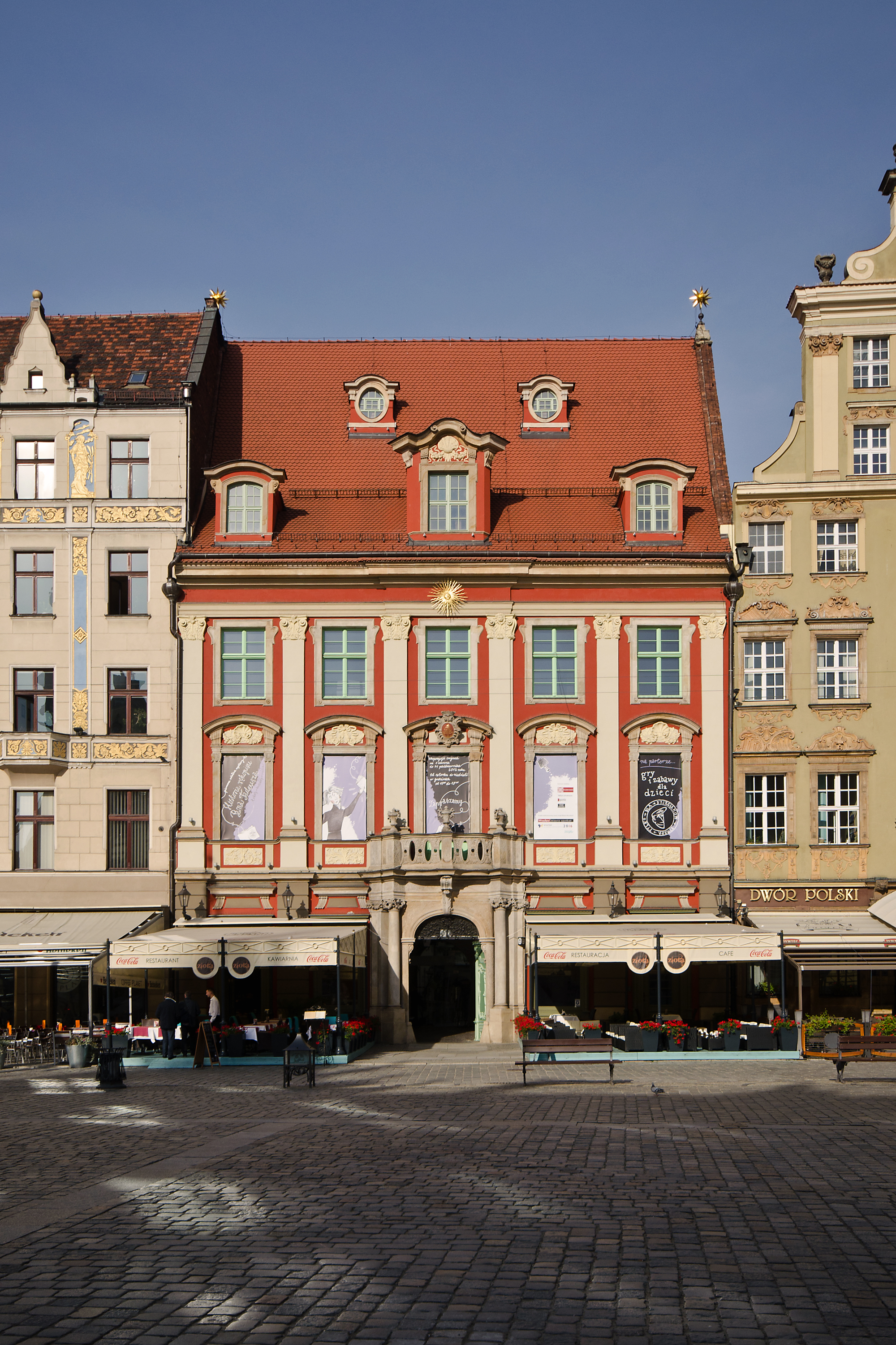 Kamienica Pod Złotym Słońcem Rynek 6, Miasto Wrocław - Stare Miasto